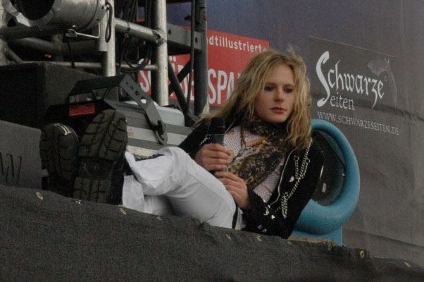 Jonne Aaron von der finnischen Band Negative auf dem M'era Luna Festival in Hildesheim